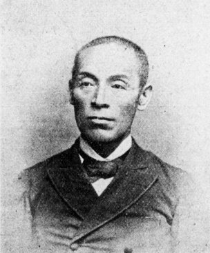 矢島中（1852-1922）